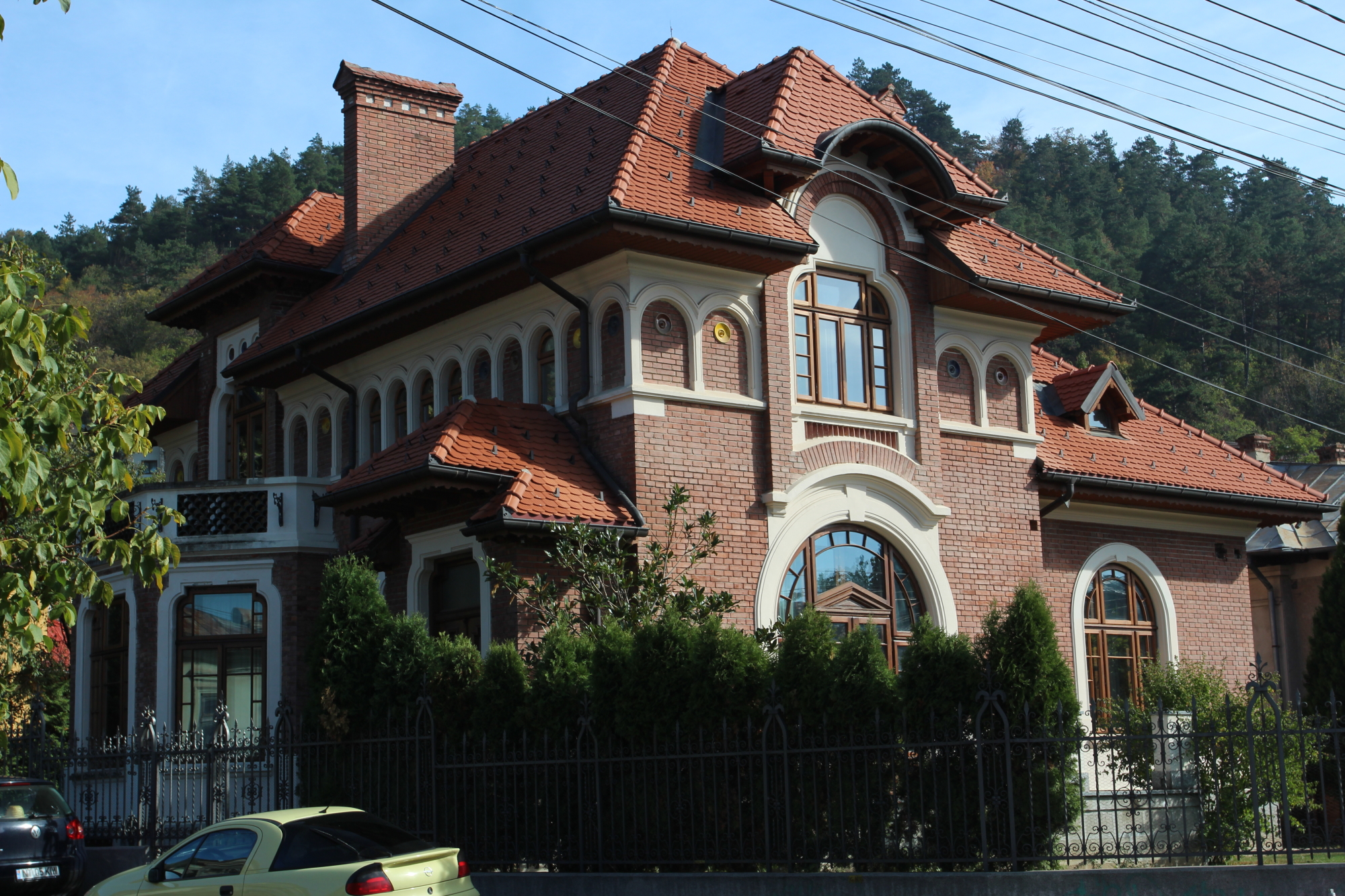 Vila Eliza, azi sediul S. C. "Moldavia" S. A.